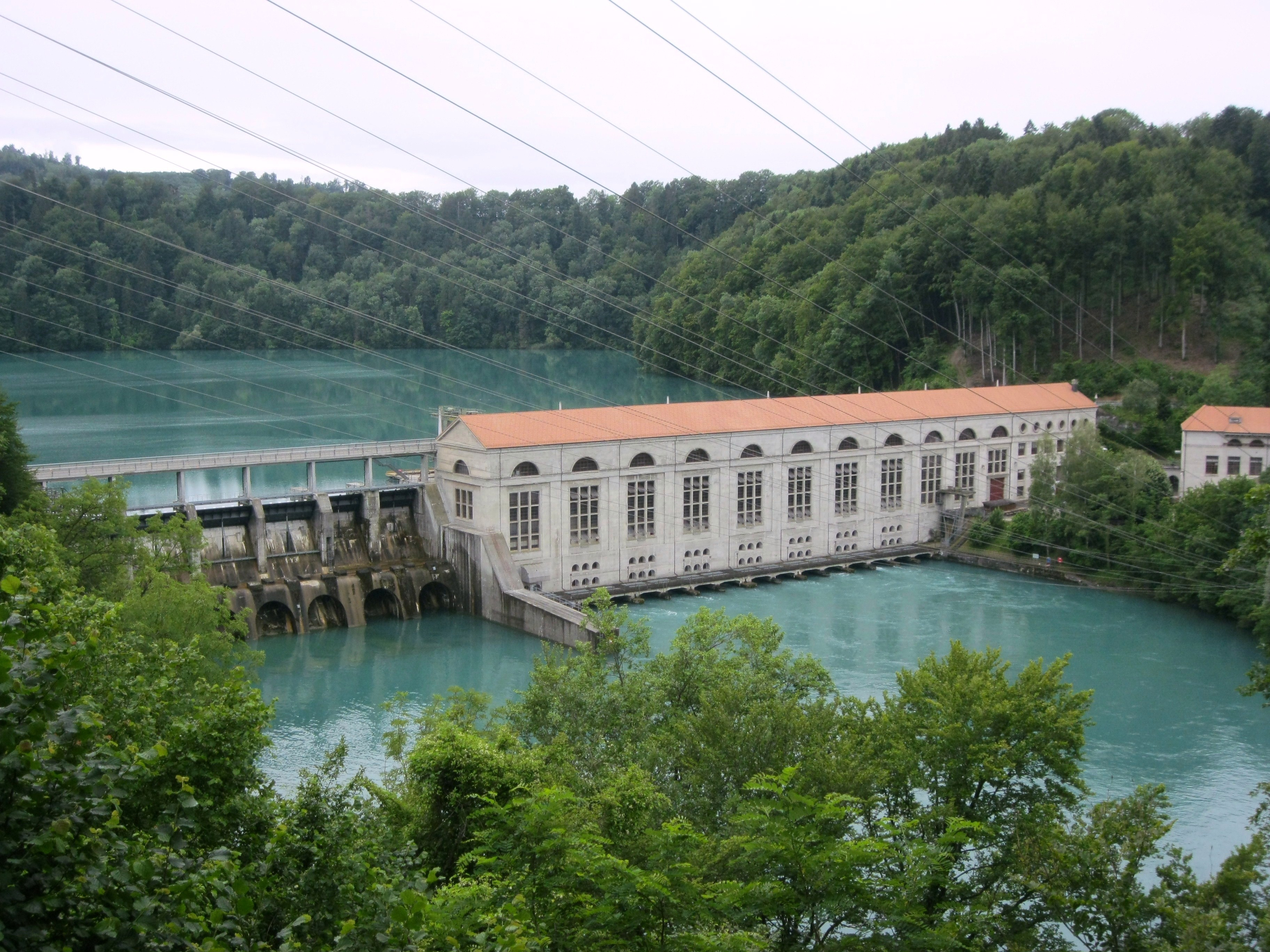 Diga di Mühleberg (Wohlensee)